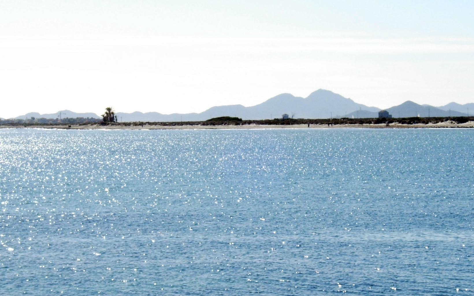 Vista desde el mar.